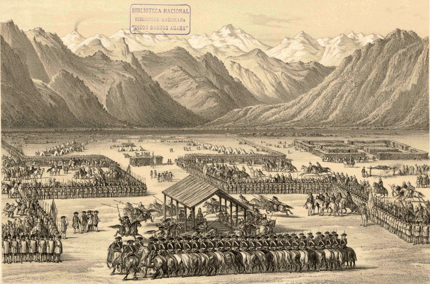 Parlamento de Negrete (1793); junta diplómática de la que emanó un tratado entre las autoridades coloniales españolas de Chile y los principales líderes del pueblo mapuche. La reunión se llevó a afecto del 4 al 7 de marzo de 1793, al borde del Río Biobío, en el vado fronterizo de Negrete, por iniciativa del capitán general y presidente de la Real Audiencia de Chile, entonces llamado Ambrosio Higgins, pero más conocido por la posterior aristocratización de su apellido a O'Higgins. Es considerado habitualmente como el más suntuoso, caro y solemne parlamento diplomático realizado en la frontera chilena del Imperio Español. Publicada por el botánico y naturalista francés Claudio Gay en la página 35 de su Atlas de la historia física y política de Chile, y basada supuestamente en un dibujo del pintor y escultor Ignacio Andia y Varela (1757–1822), parte de la comitiva española que participó en dicho parlamento.